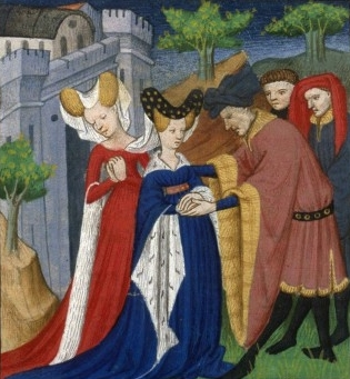 Enlèvement de Dinah, la fille de Léa et de Jacob, par Sichem le Hivvite (cf. Genèse 34). Miniature extraite de la Bible Historiale de Guyart des Moulins.